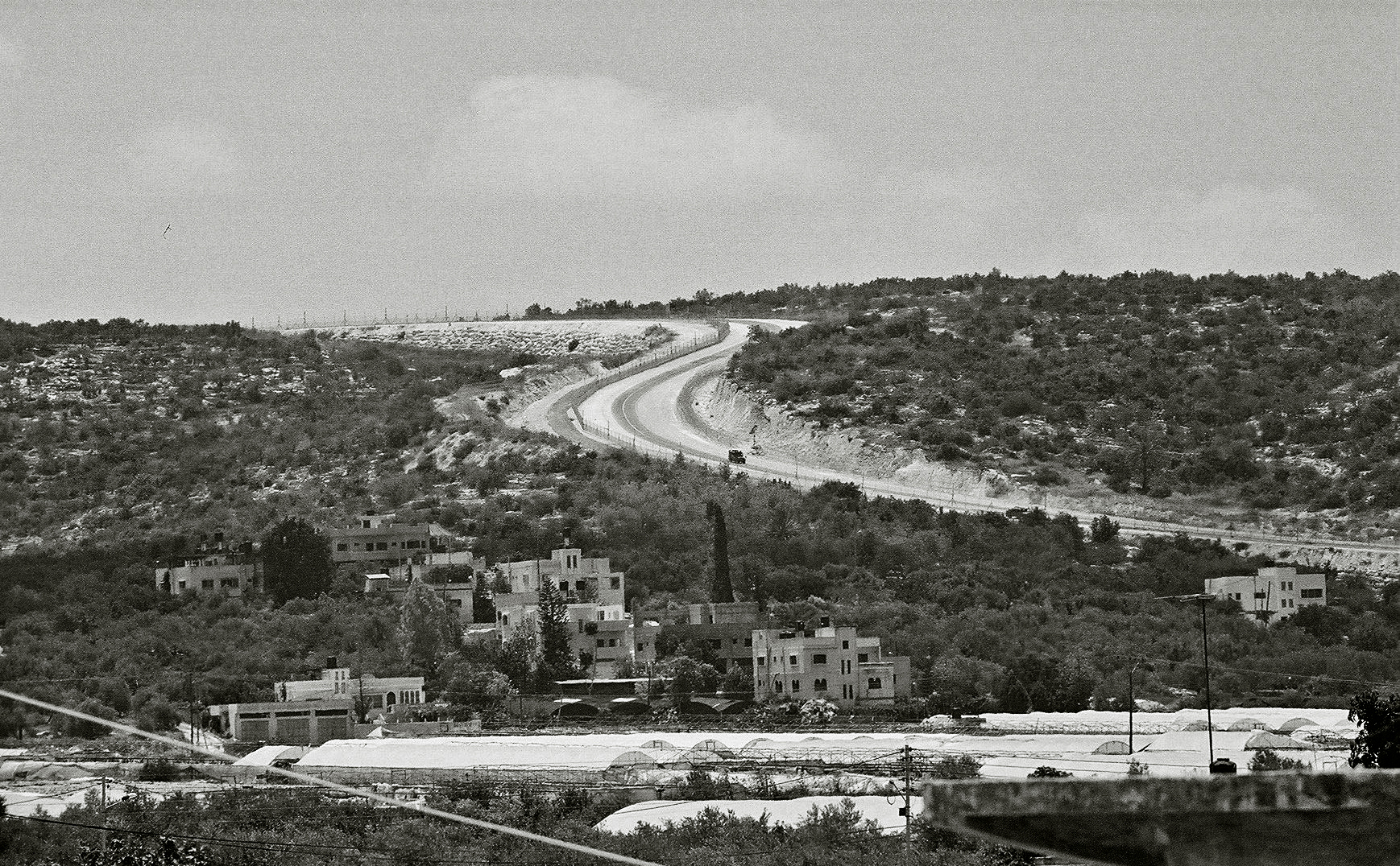 Mur de séparation près de Tulkarem, Palestine. [Juillet 2005] Auteur : Utilisateur:Simio.